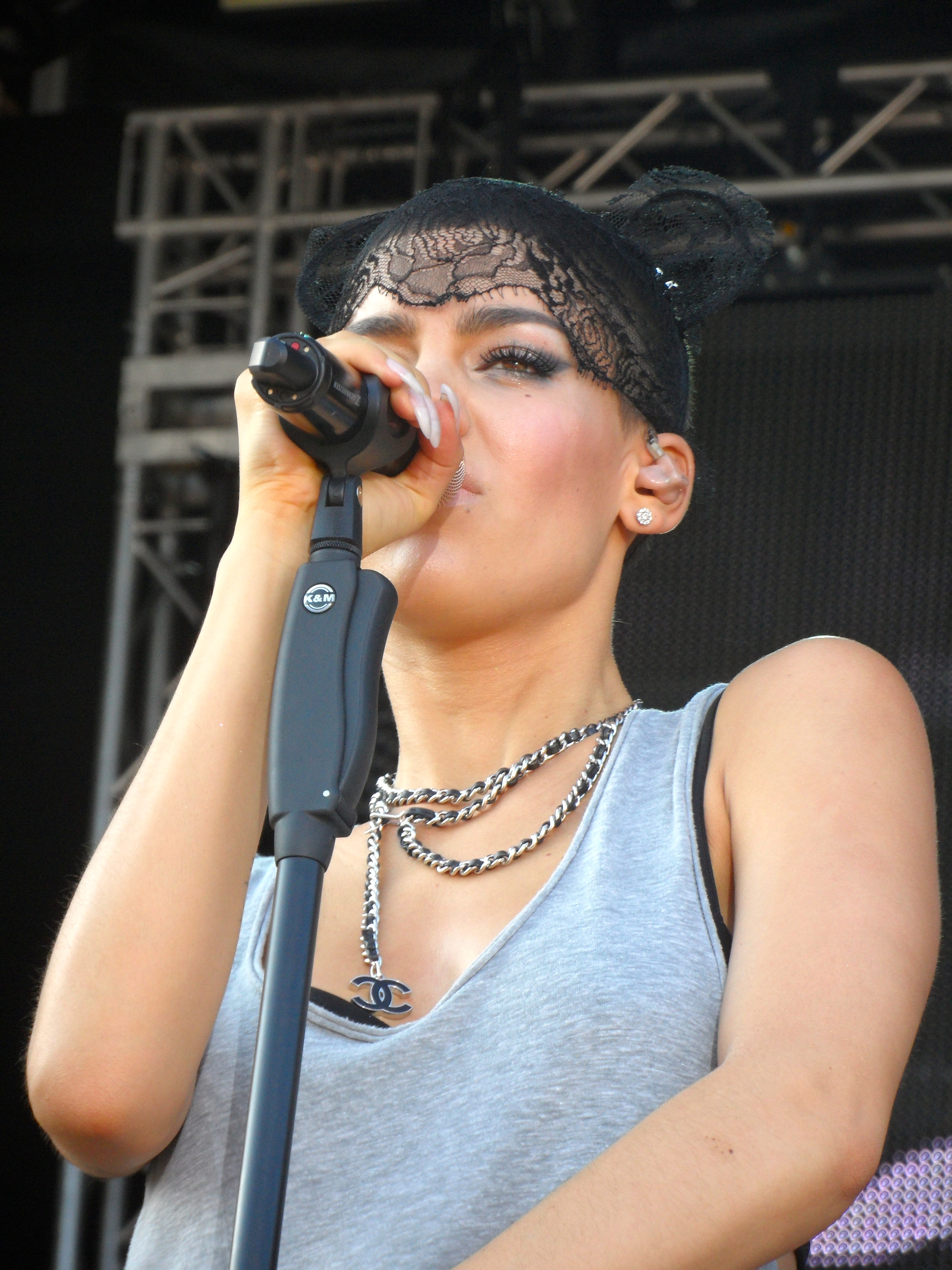 Frida Gold bei stars@nrd2 in Vechta